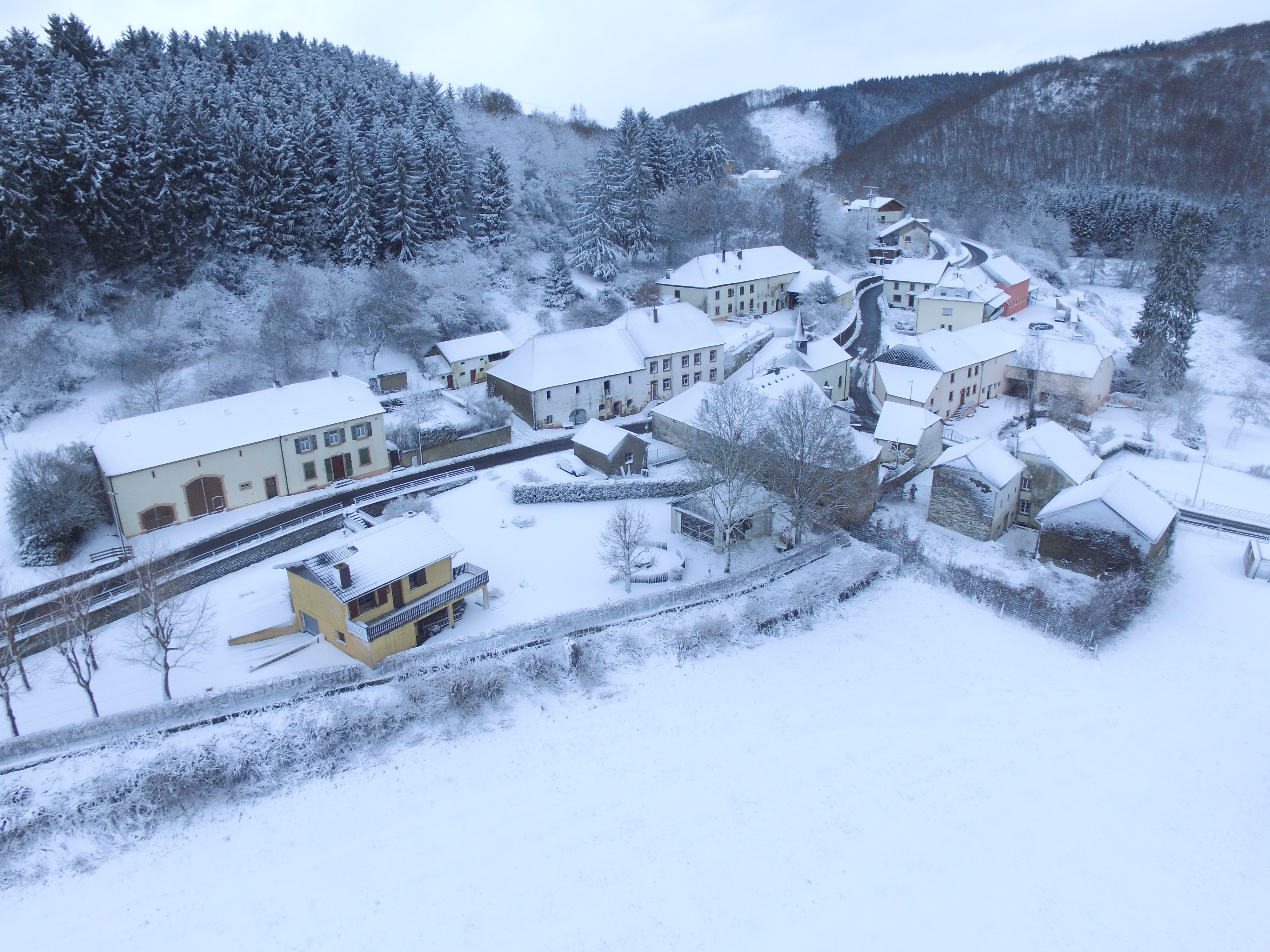 Siwwenaler vun uewen